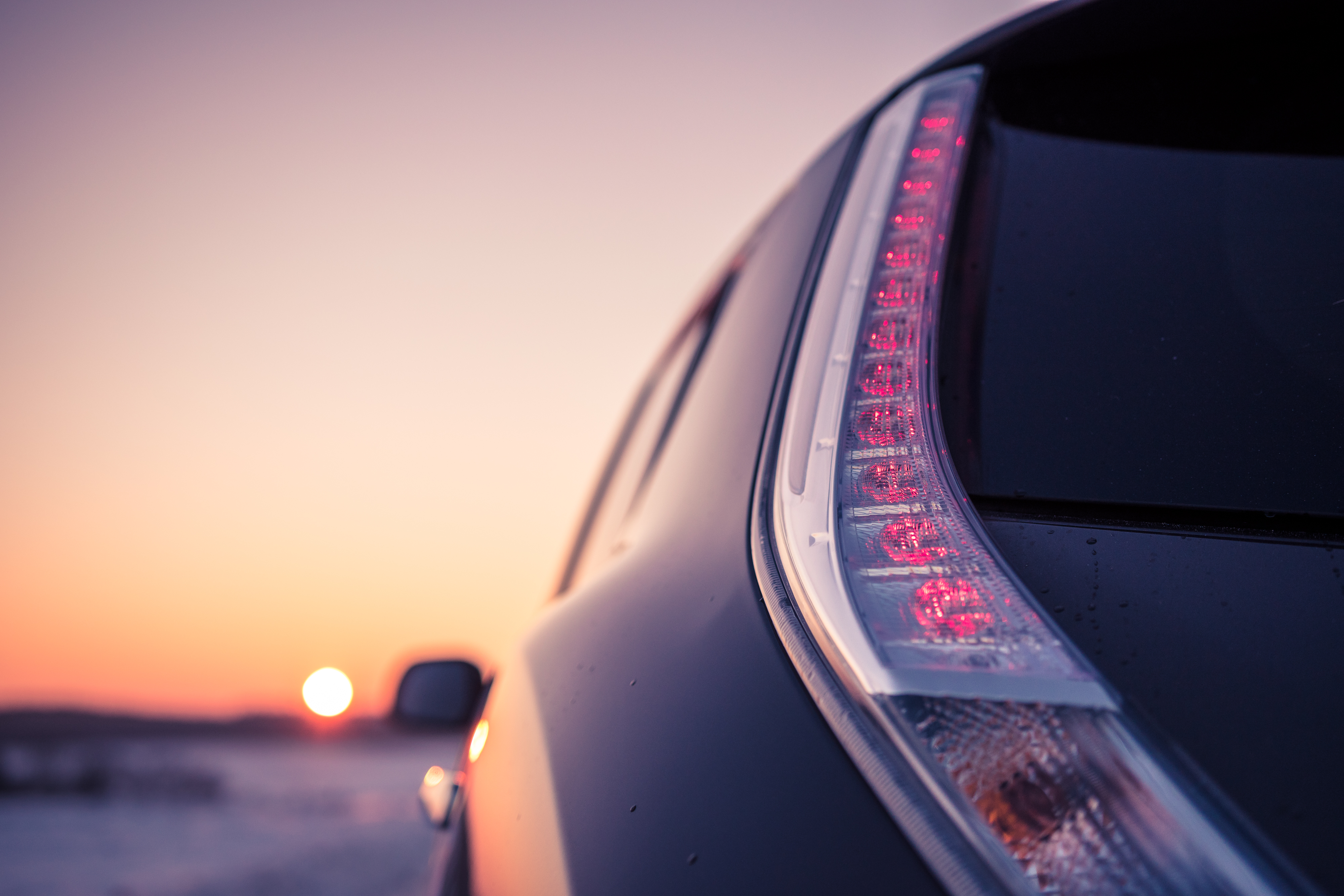 Der neue Nissan Leaf (30 kWh) in der Probefahrt.